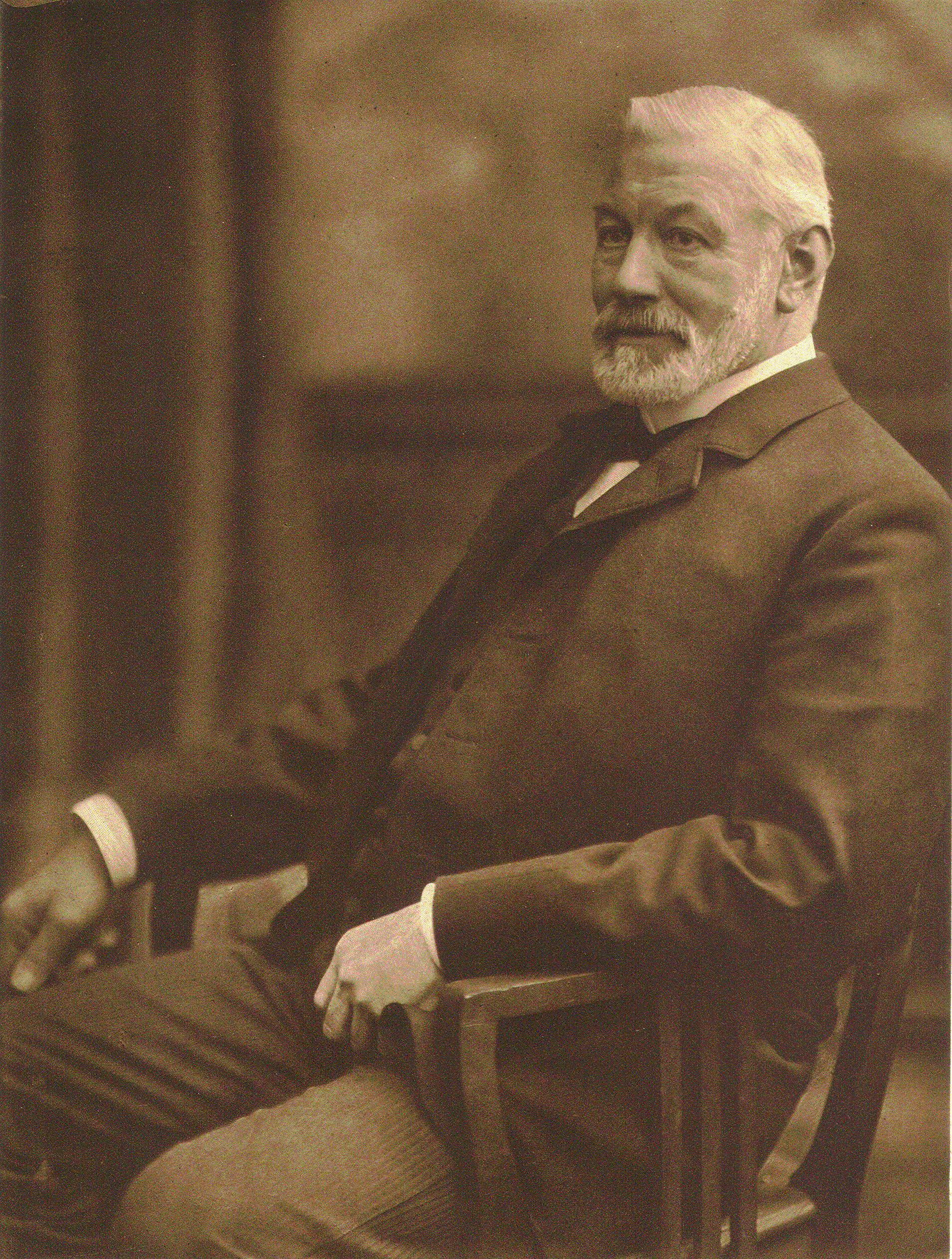 Heinrich Adolf Tietgens (1841–1920), deutscher Kaufmann (F. Robertson & Tietgens), MdHB